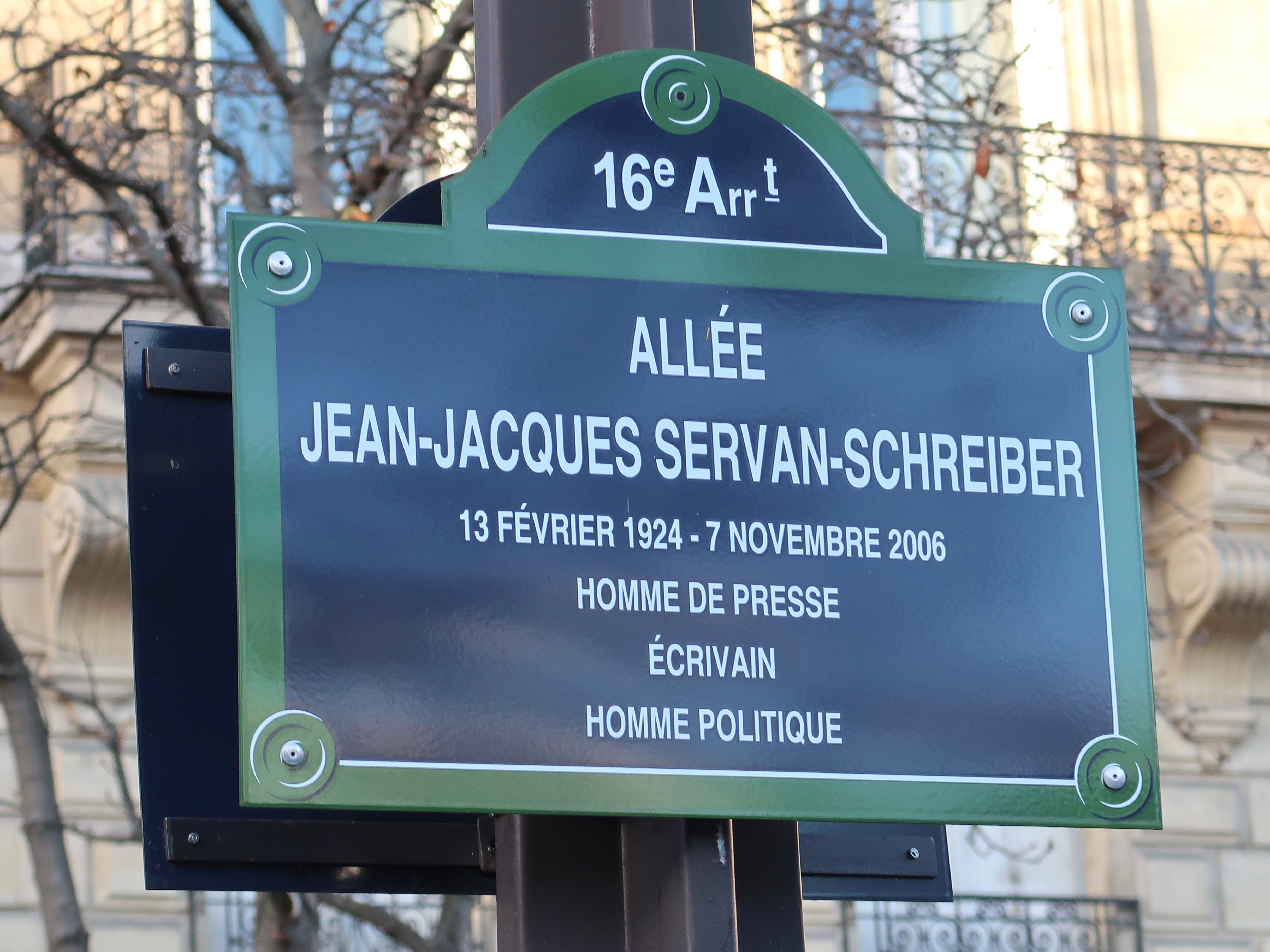 Plaque de l'allée Jean-Jacques-Servan-Schreiber, au centre de l'avenue du Président-Wilson (Paris, 16e).